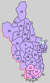 山口県玖珂郡の町村制時点の町村。